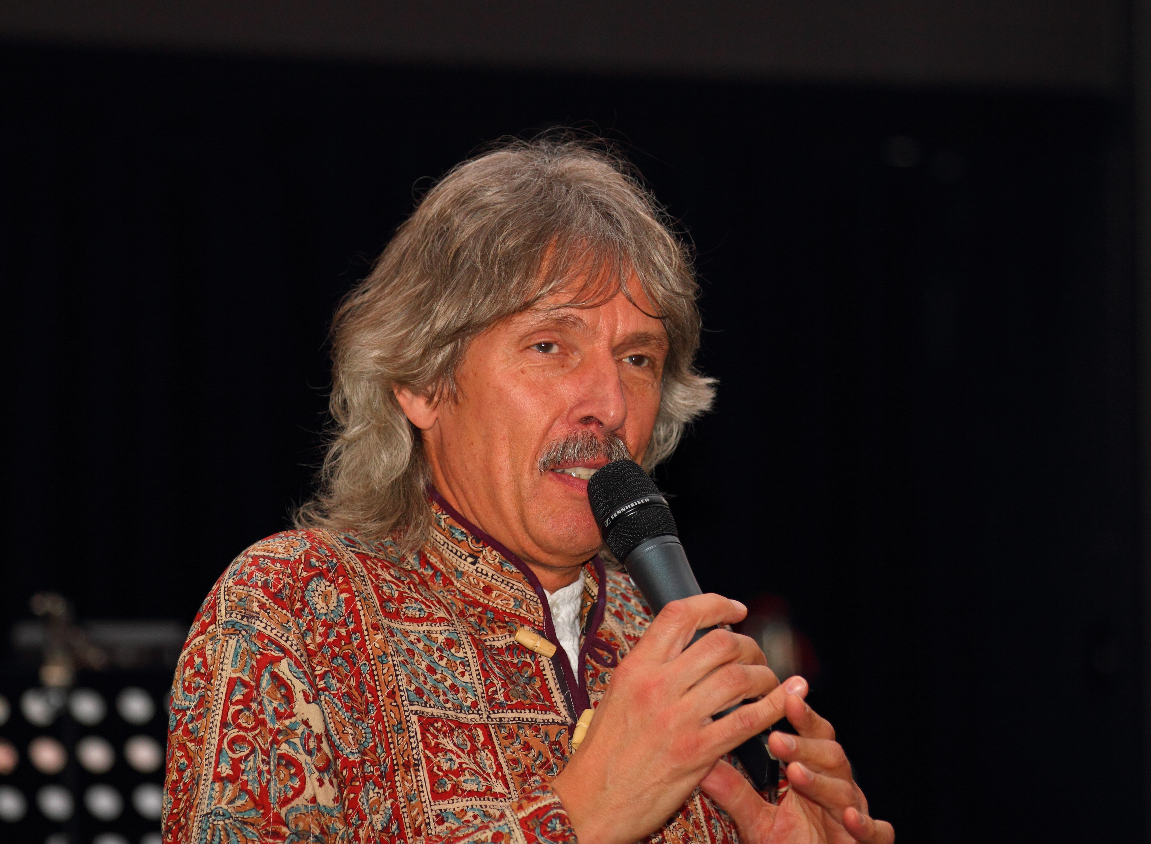 Verleihung des Schallwelle-Musikpreises am 10. März 2012. Kuppel des Planetariums Bochum. Bekanntgabe des Gewinners in der Kategorie «Beste CD international» mit Klaus Hoffmann-Hoock als Laudator.